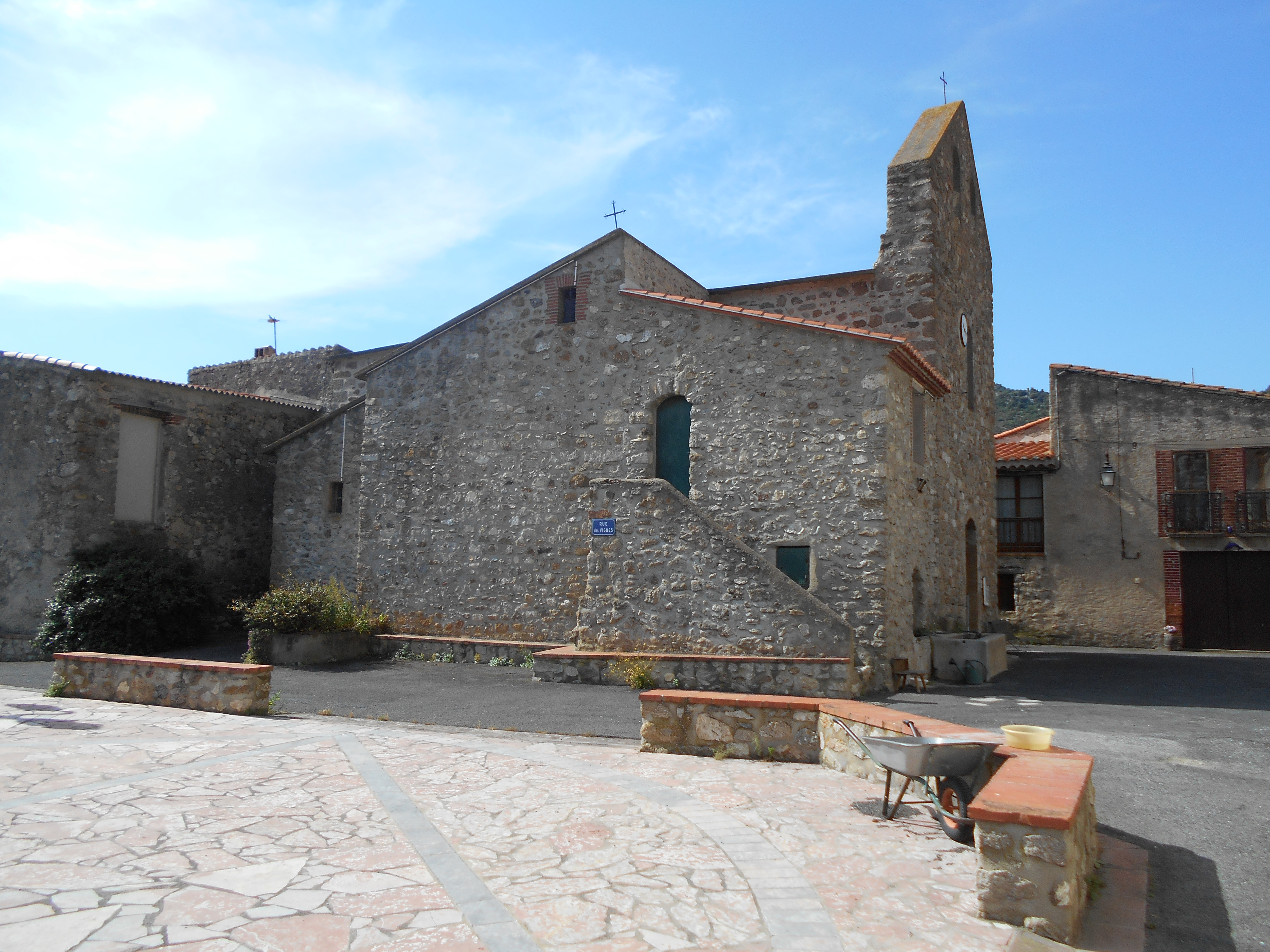 Sant Andreu de Tarerac des del nord-uest